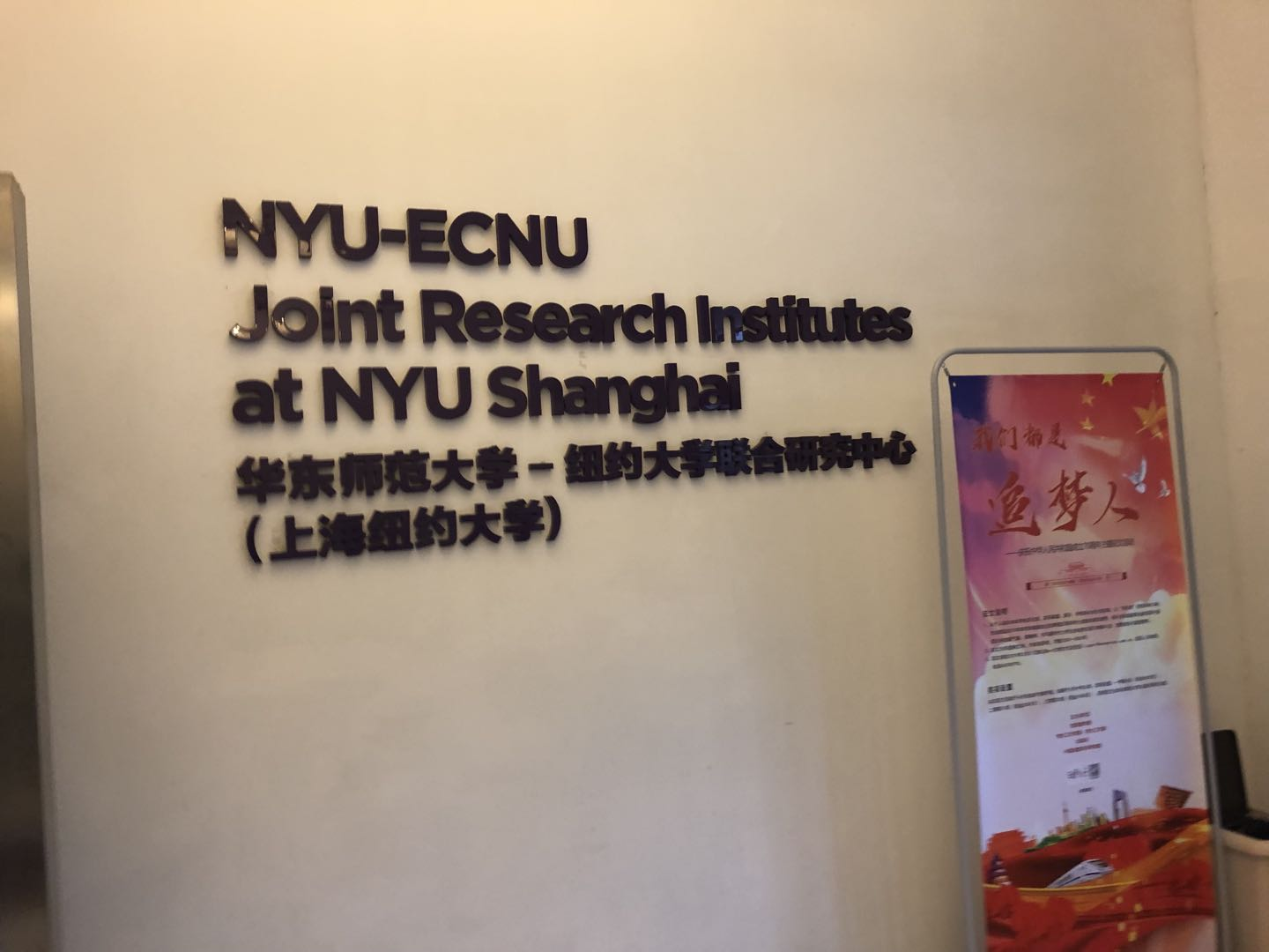 中文（中国大陆）: 华东师范大学-纽约大学联合研究中心（上海纽约大学），位于华东师范大学中山北路校区地理馆内